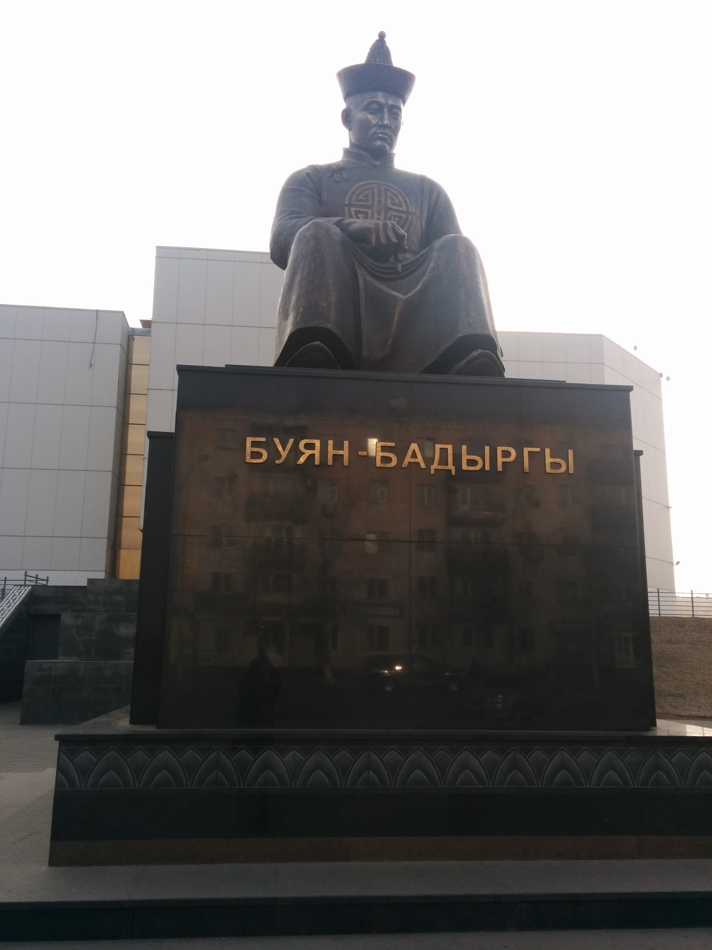 Тыва дыл: Тываның Национал Музейиниң соңгу талазында Буян-Бадыргының тураскаалы. 2014 чыл. Бертинден тырттырган чурук